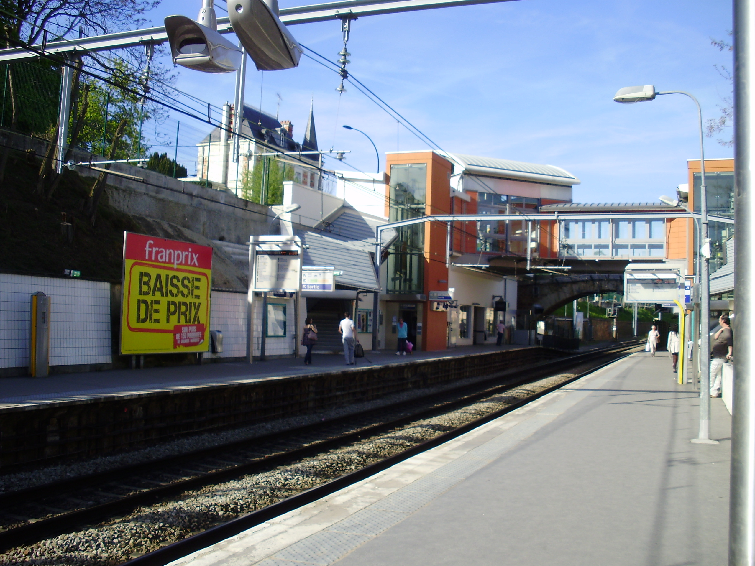 Gare de Palaiseau, Essonne, France (vue en direction d'Aéroport CDG 2/Mitry - Claye depuis le quai pour Saint-Rémy-lès-Chevreuse)